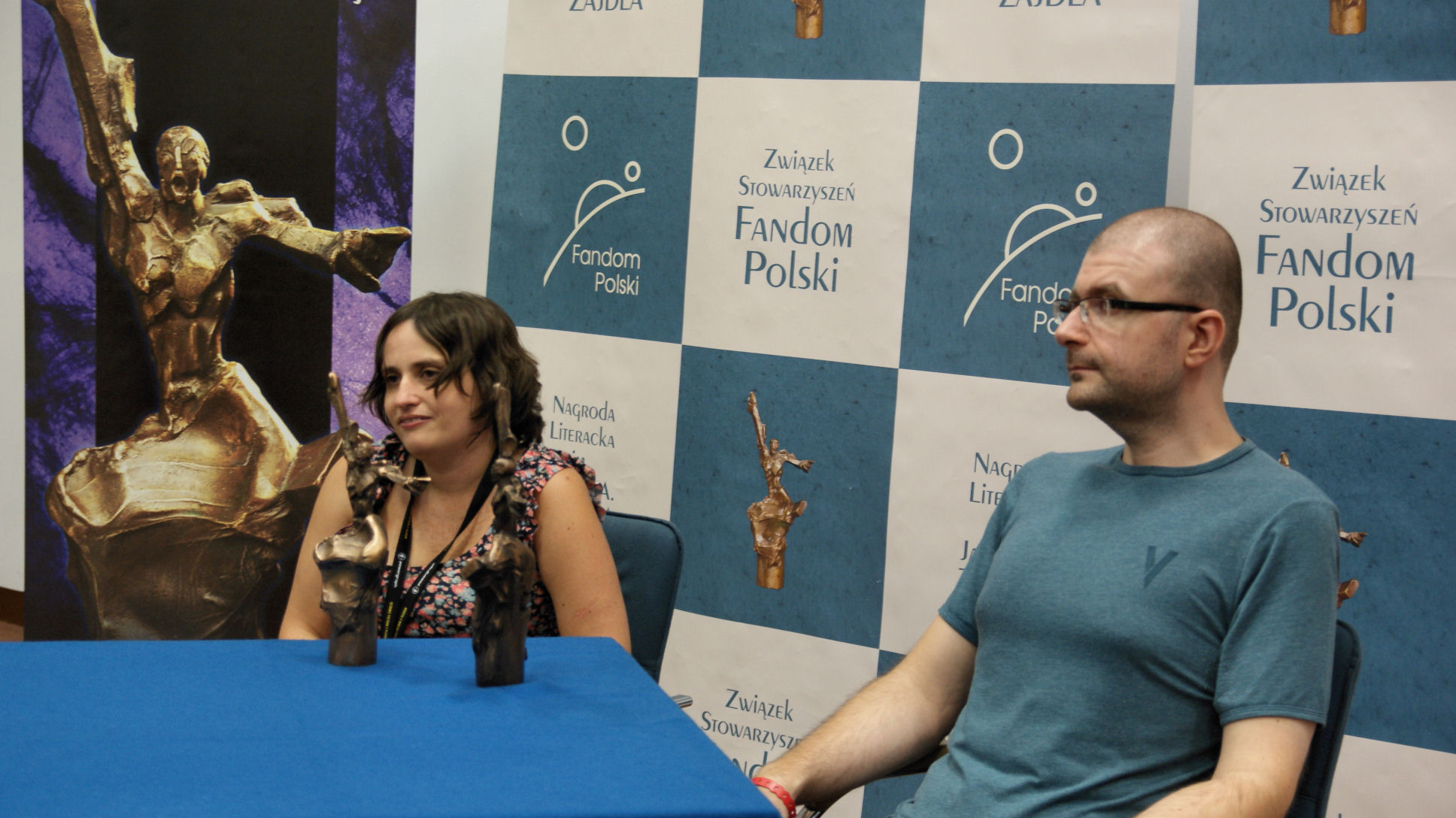 Laureaci nagrody im. J. Zajdla za rok 2010. Polkon 2011 w Poznaniu